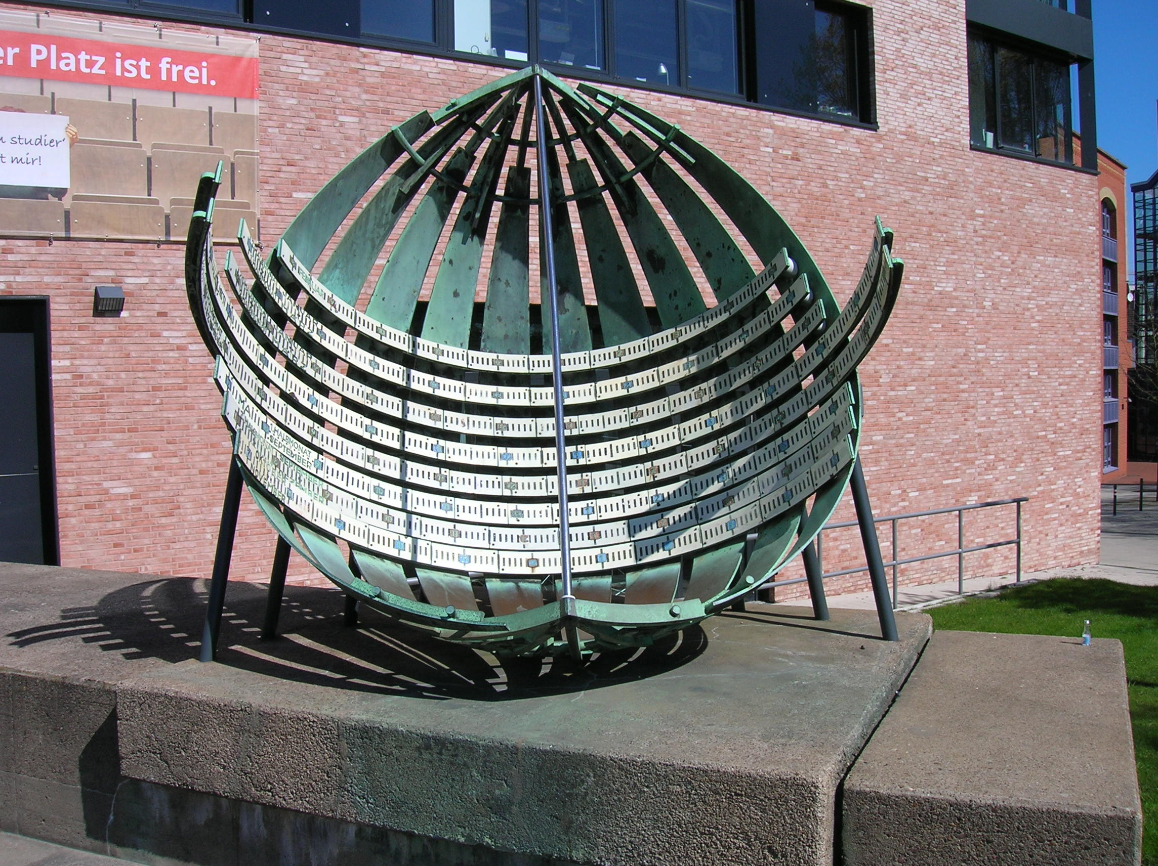 Äquatorial-Uhr von Bodo Sturmheit an der Columbusstraße in Mitte (Bremerhaven)